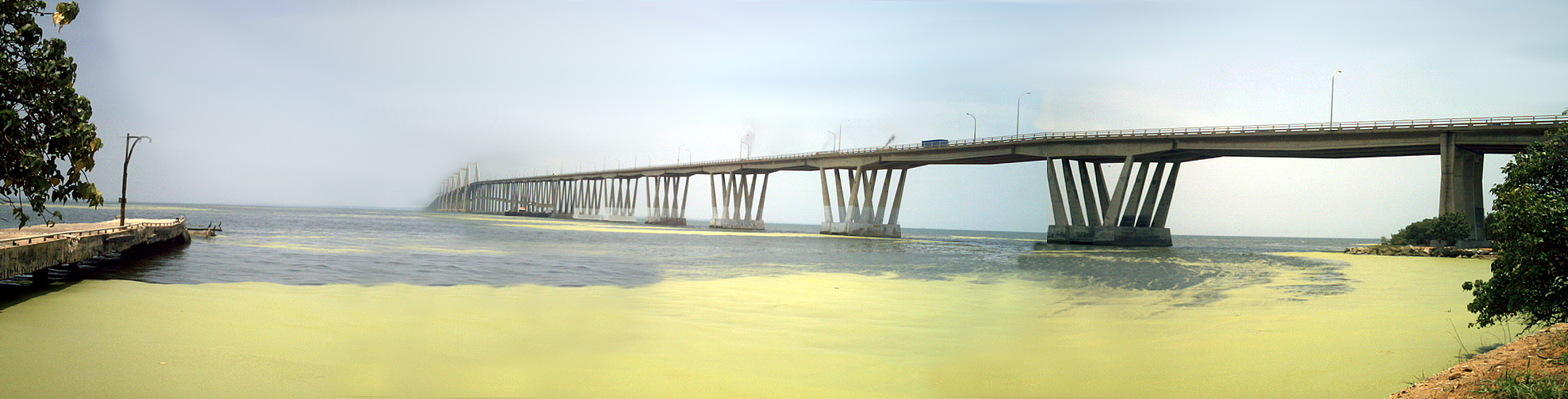 Panorámica del puente sobre el lago de maracaibo, se puede observar el nivel de contaminación de la Lemna obscura (Austin) Daubs, fotografía tomada desde el museo llamado "Visita tu Puente". Municipio San Francisco, Edo. Zulia, Venezuela.